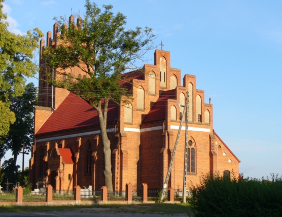 Płochocin 9 - rzymskokatolicki kościół parafialny p.w. św. Wawrzyńca, 1891